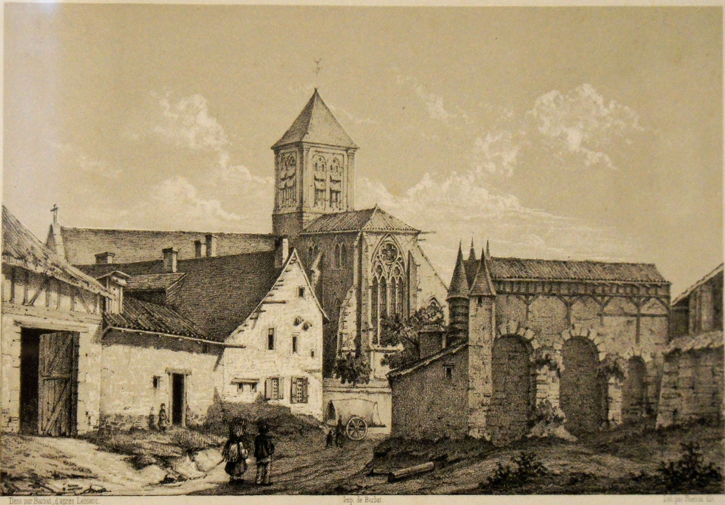 Église st-Jean et auberge cheval blanc où naquit Appert, dessin de Leblanc 1792.